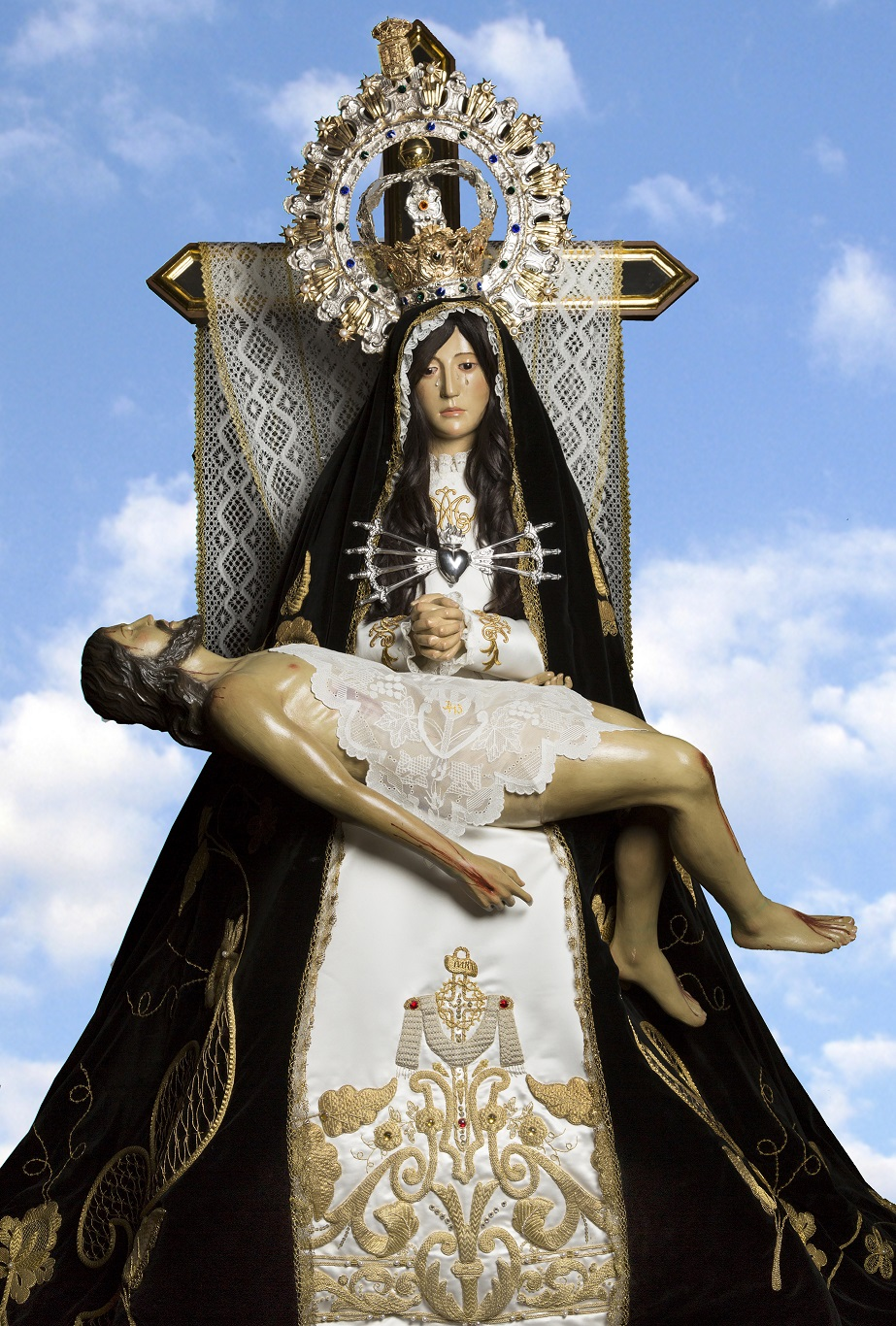 angustias castillo garcimuñoz